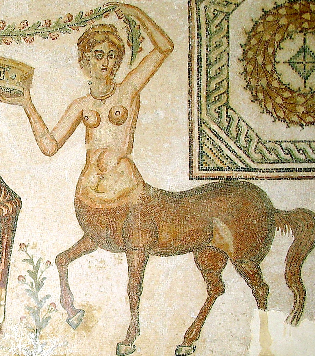 Centauresse. Mosaico pavimentale romano al Museo del Bardo a Tunisi. II secolo d.C.